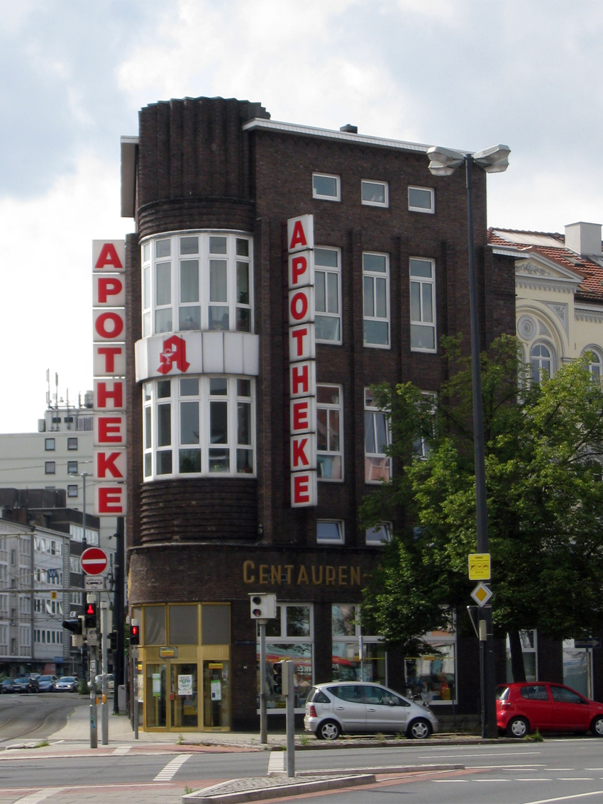 Centauren-Apotheke in Bremen, Dobbenweg 11, 12 / Außer der Schleifmühle.Das abgebildete Objekt ist ein geschütztes Kulturdenkmal in der Freien Hansestadt Bremen, mit der Nr. 0313 beim Landesamt für Denkmalpflege registriert.